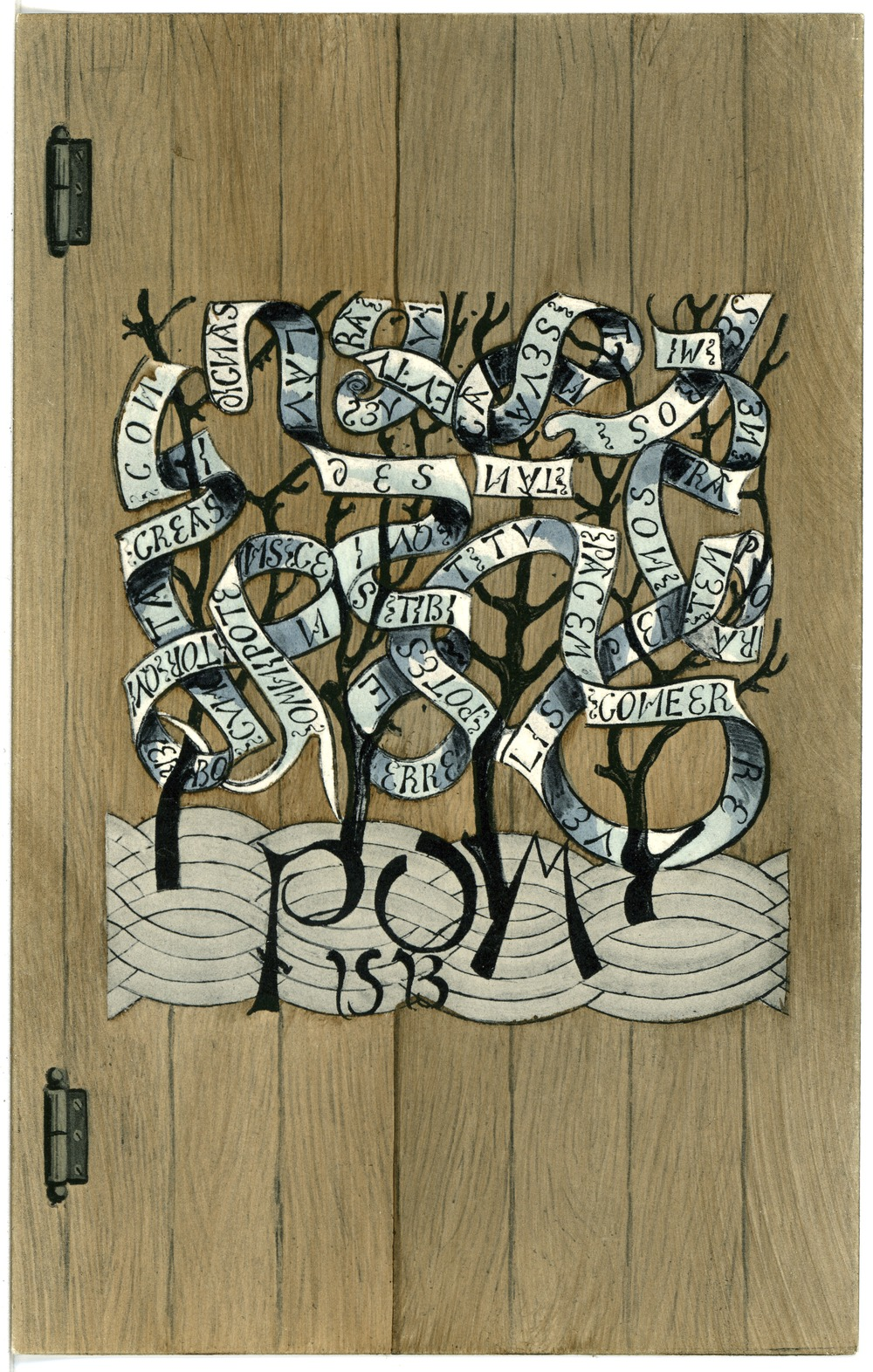 Nossen-Altzella; Türflügel einer Betkapelle - Strafarbeit eines Mönchs This postcard is from publisher Brück & Sohn in Meißen ( postcard has a unique number 17850 and is available in a higher resolution at the publisher. This images was uploaded in a cooperation project between Wikipedians and the publisher.